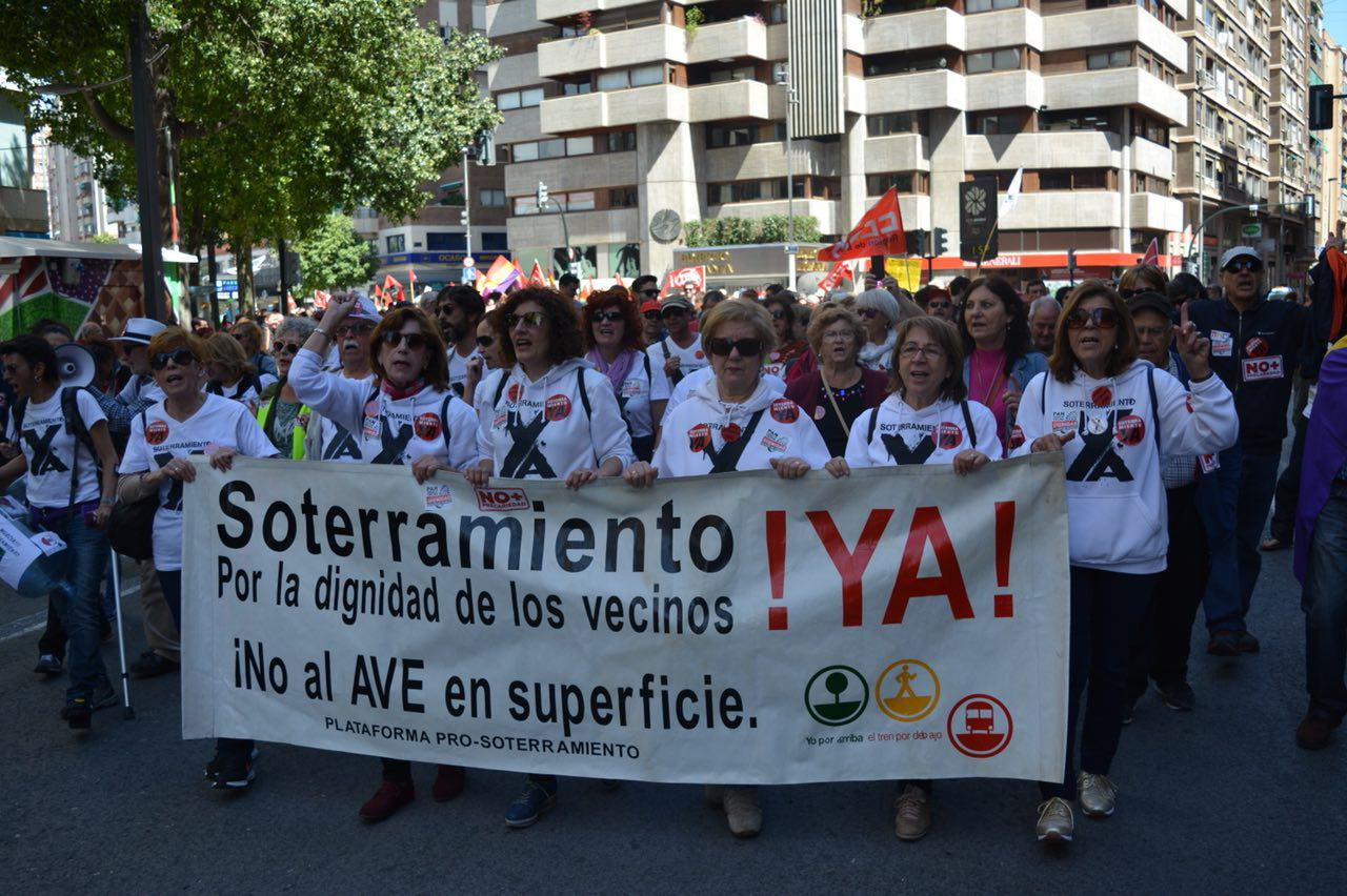 mujeres vías Murcia